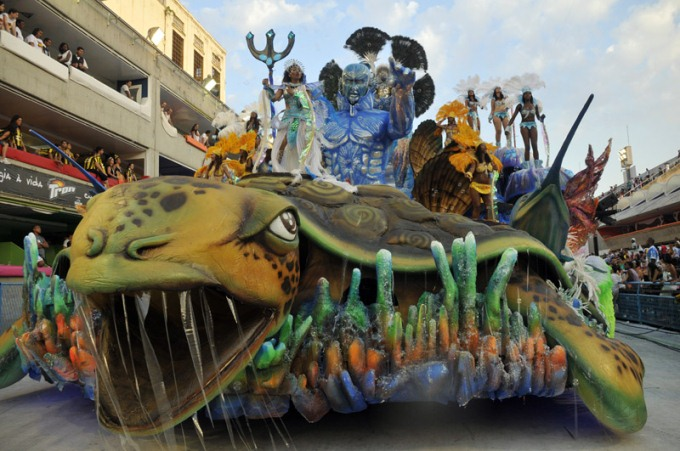 Desfile de 2009 dos Acadêmicos de Santa Cruz. Foto: Ricardo Almeida.